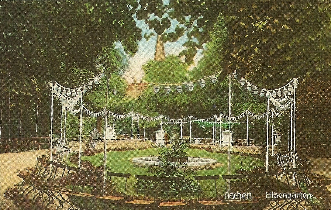 Elisengarten mit Springbrunnen; Blick in Richtung St. Foillan